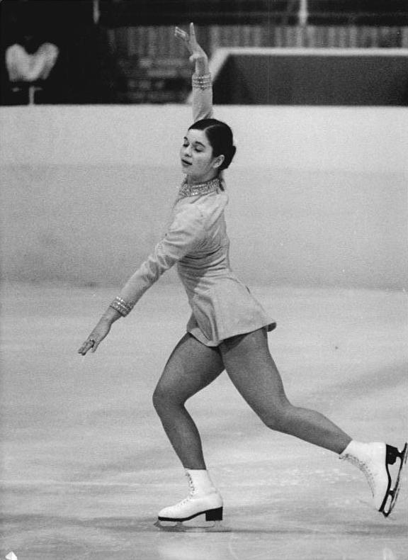 Christine Errath ADN-ZB Mittelstädt 12.1.1974 Berlin: DDR-Meisterschaften im Eiskunstlaufen vom 11. bis 13.1.1974 in der Eissporthalle im Sportforum.- Die Europameisterin und Weltmeisterschaftsdritte Christine Errath (SC Dynamo Berlin), hier bei ihrer Pflichtkür, hat die besten Aussichten ihren ersten DDR-Meisterschaftstitel zu erkämpfen.